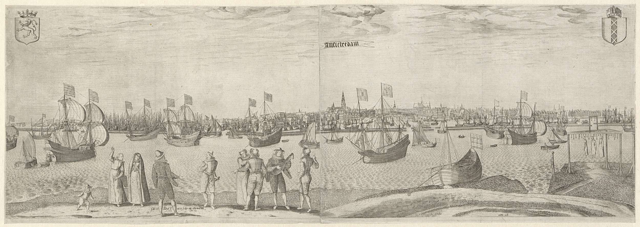 Gezicht op de stad Amsterdam van af het IJ. 1599. engraving on paper. Amsterdam, Rijksmuseum Amsterdam.